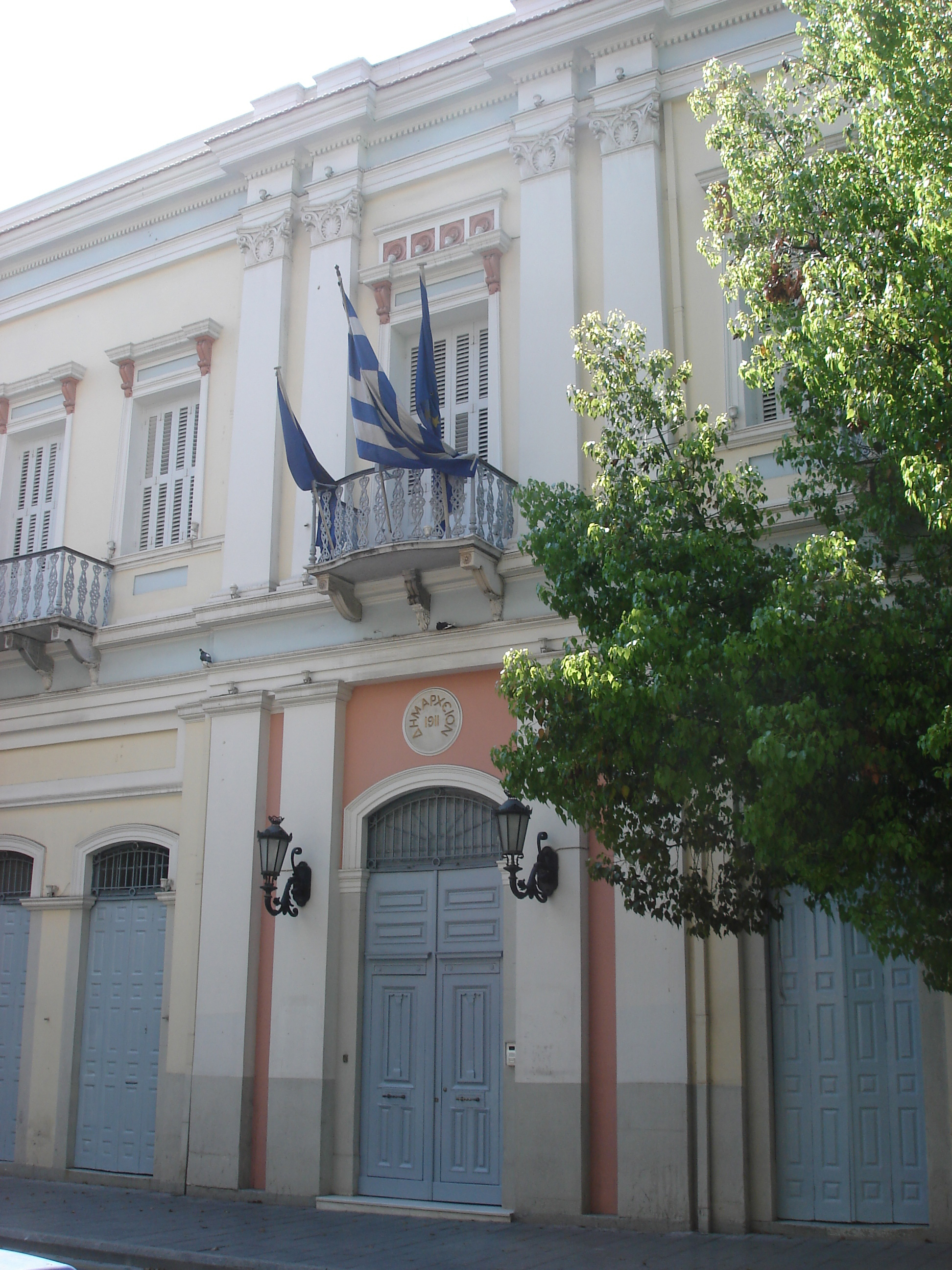 Old city hall, Patra ,Achaea ,Greece Παλιό δημαρχείο Πάτρας